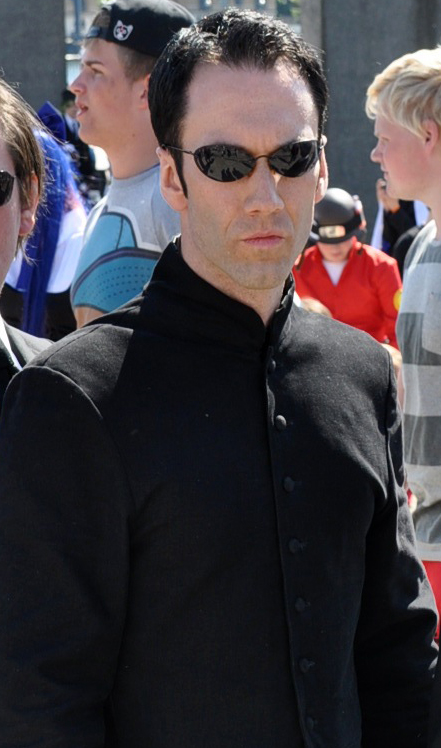 Neo personaje principal de las sagas de Matrix